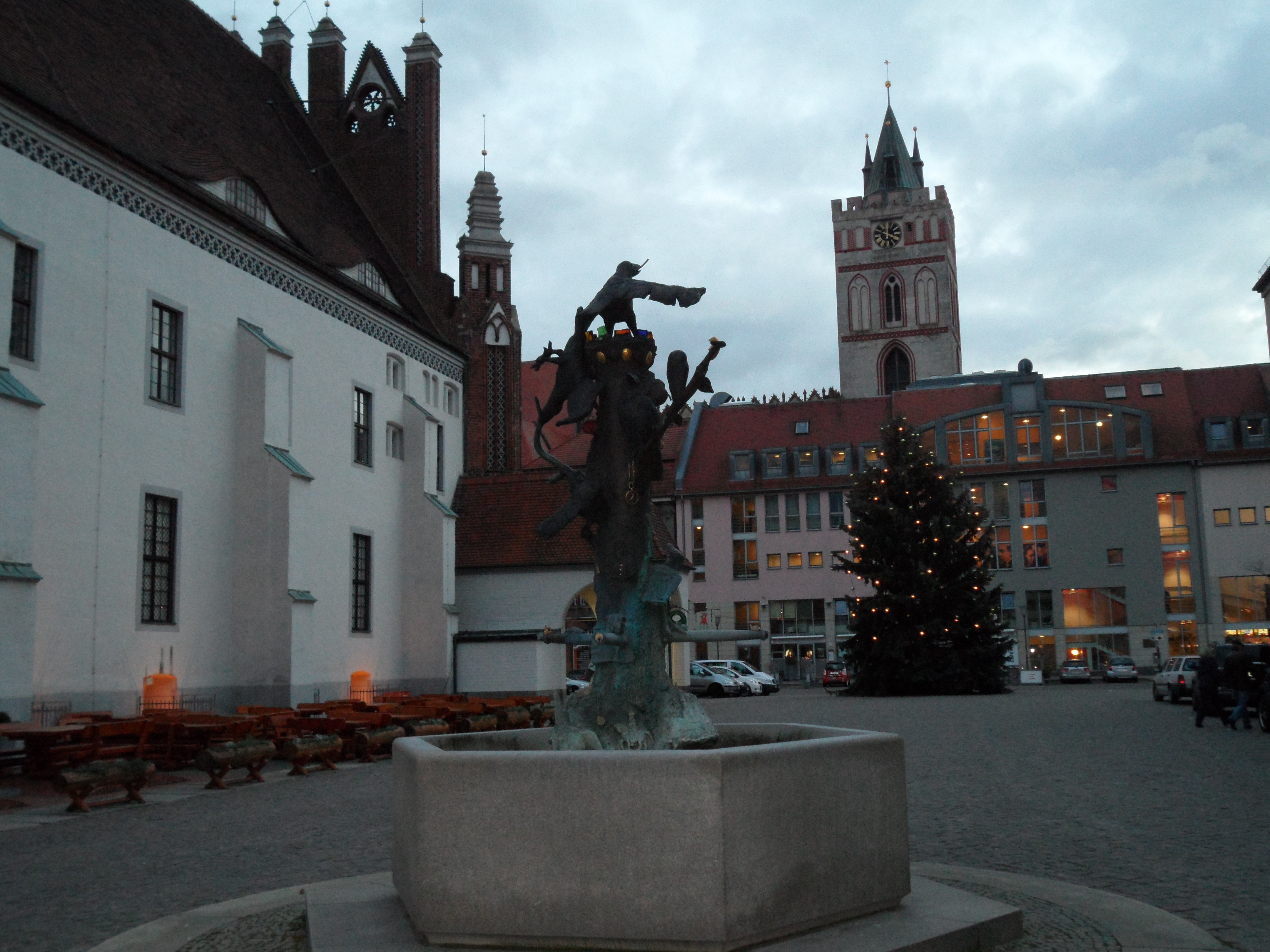 Sieben Raben Brunnen in Frankfurt (Oder) von Horst Engelhardt, im Hintergrund die St. Marienkirche